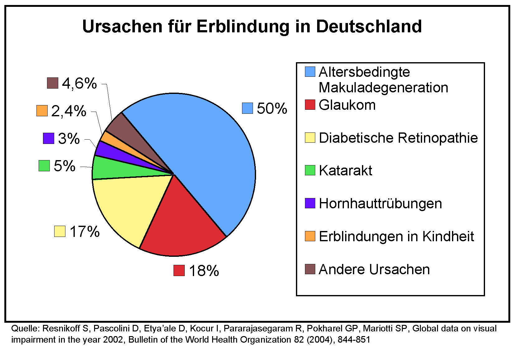 Anteile verschiedener Ursachen an der Gesamtzahl von Erblindungen in Westeuropa Datengrundlage ist die Untersuchung der WHO von 2002 für die Länder Dänemark, Finnland, Island, Irland, Italien, Niederlande und Vereinigtes Königreich.